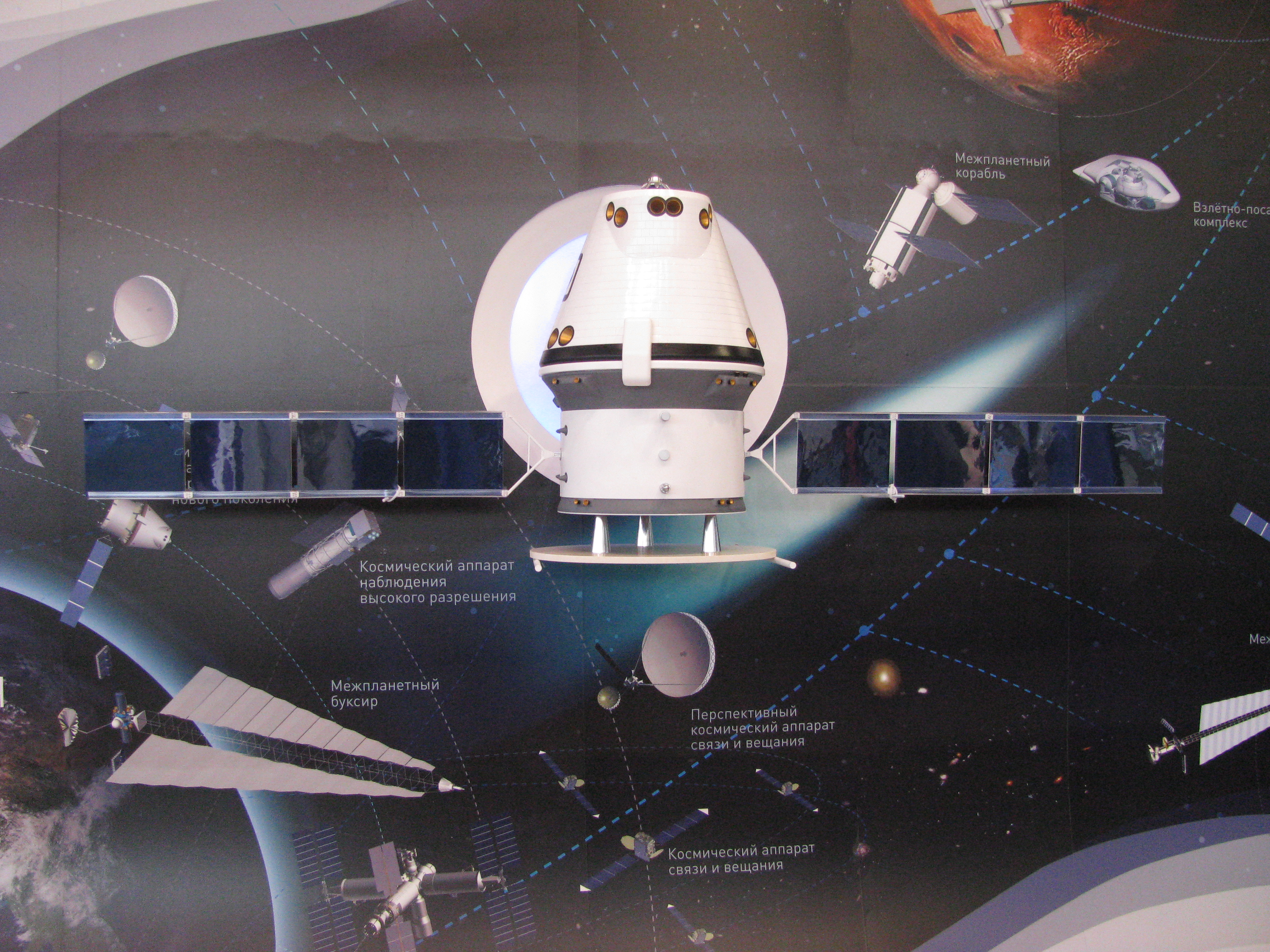 Макет ПТК НП на стенде РКК "Энергия" на выставке МАКС 2009